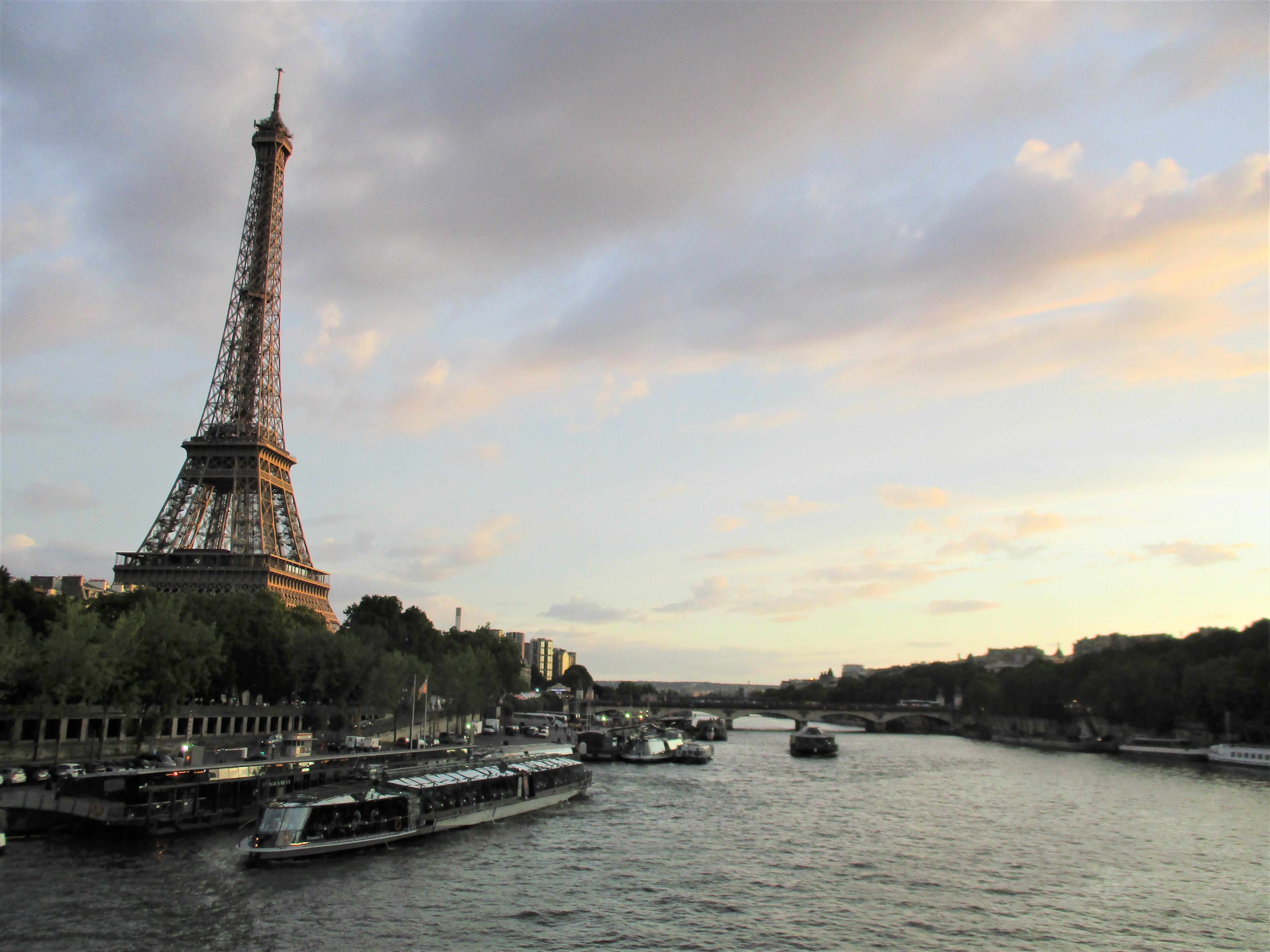 セーヌ川にかかる橋から撮影